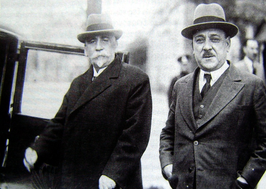 Андрей Ляпчев и Атанас Буров